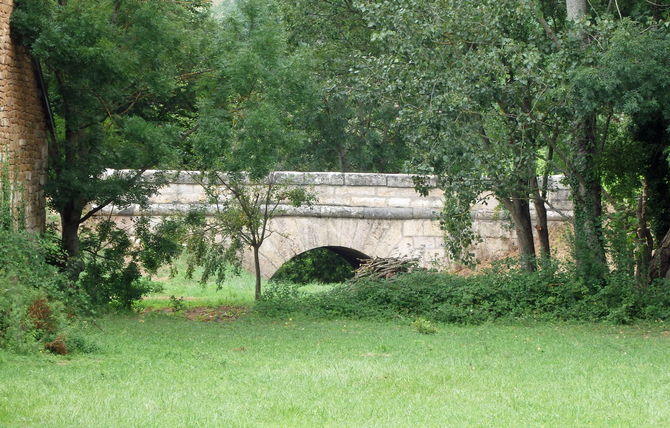 Le pont de pierre enjambant l'Ail,affluent de la Bourbonne, à Lugny.